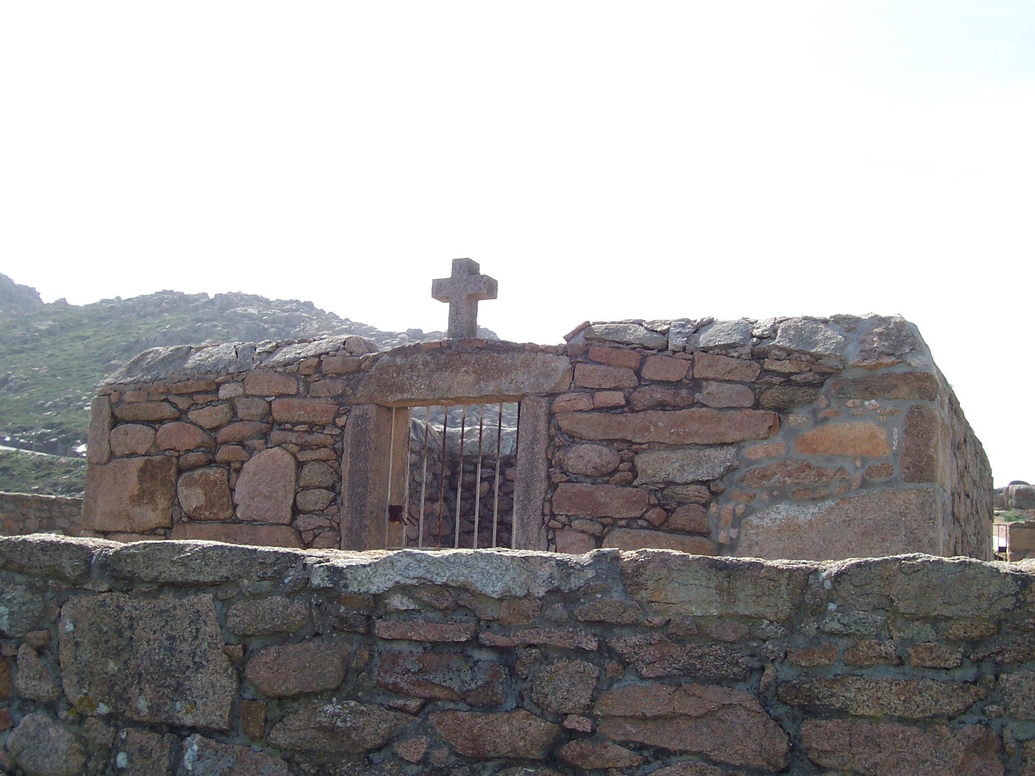 Cemiterio dos Ingleses, Camariñas, Galiza.